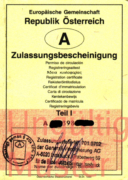 Deckblatt der Zulassungsbescheinigung Republik Österreich